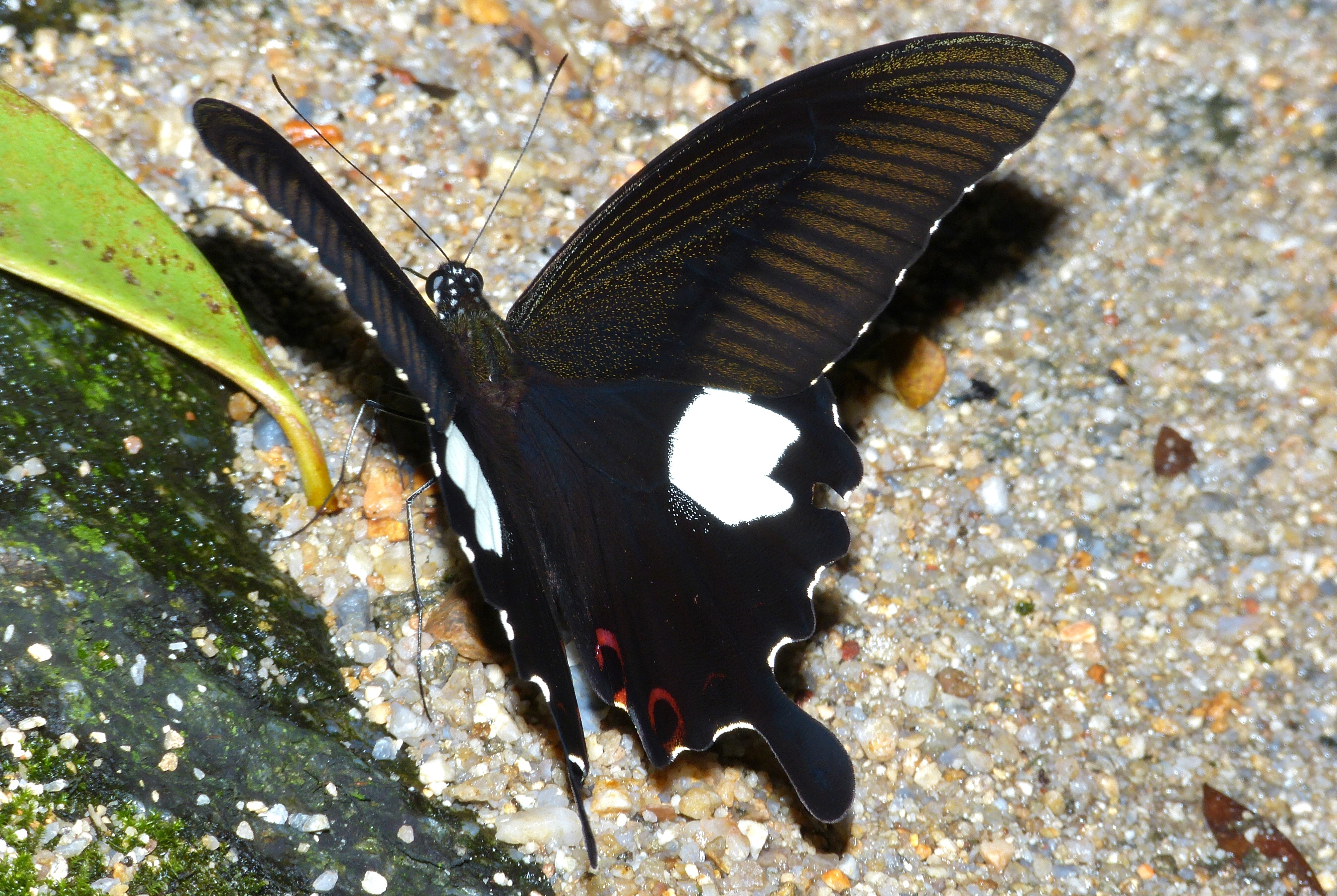 Tapah Hills, Perak, MALAYSIA